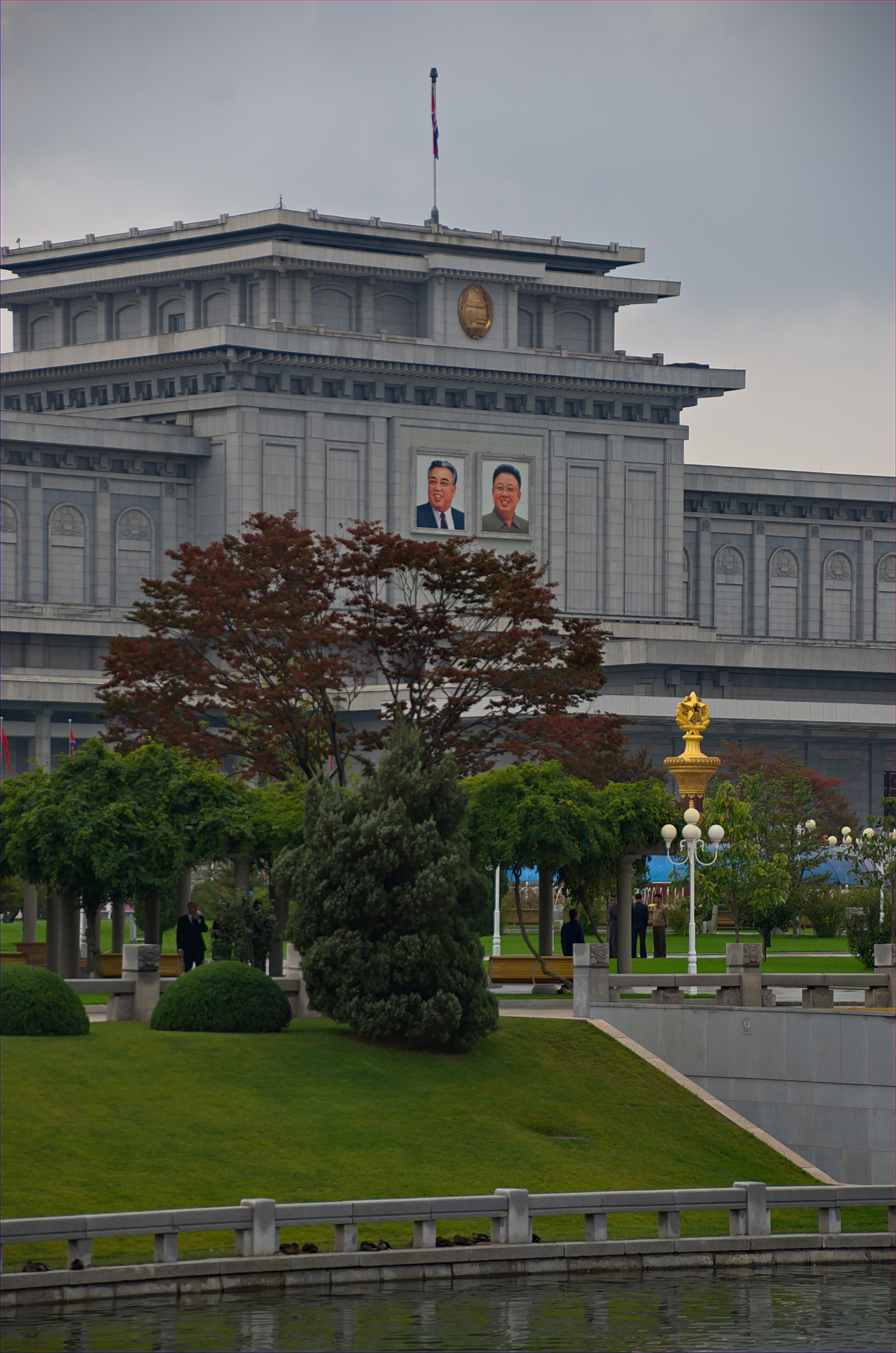 Nordkorea 2015 - Pjöngjang - Mausoleum